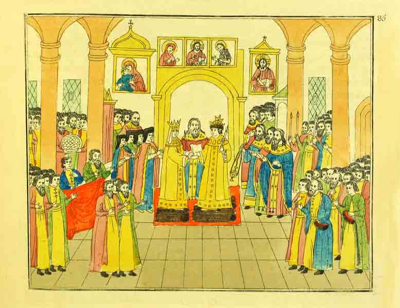 Венчание протопопом Благовещенского собора Максимом царя Михаила Феодоровича с Евдокией Лукьяновной Стрешневой. Миниатюра из кн. “Описание в лицах торжества, проходившего в 1626 г.”. М., 1810